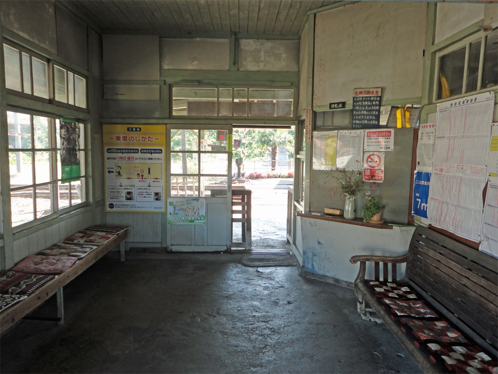 富山地方鉄道本線西魚津駅駅舎内